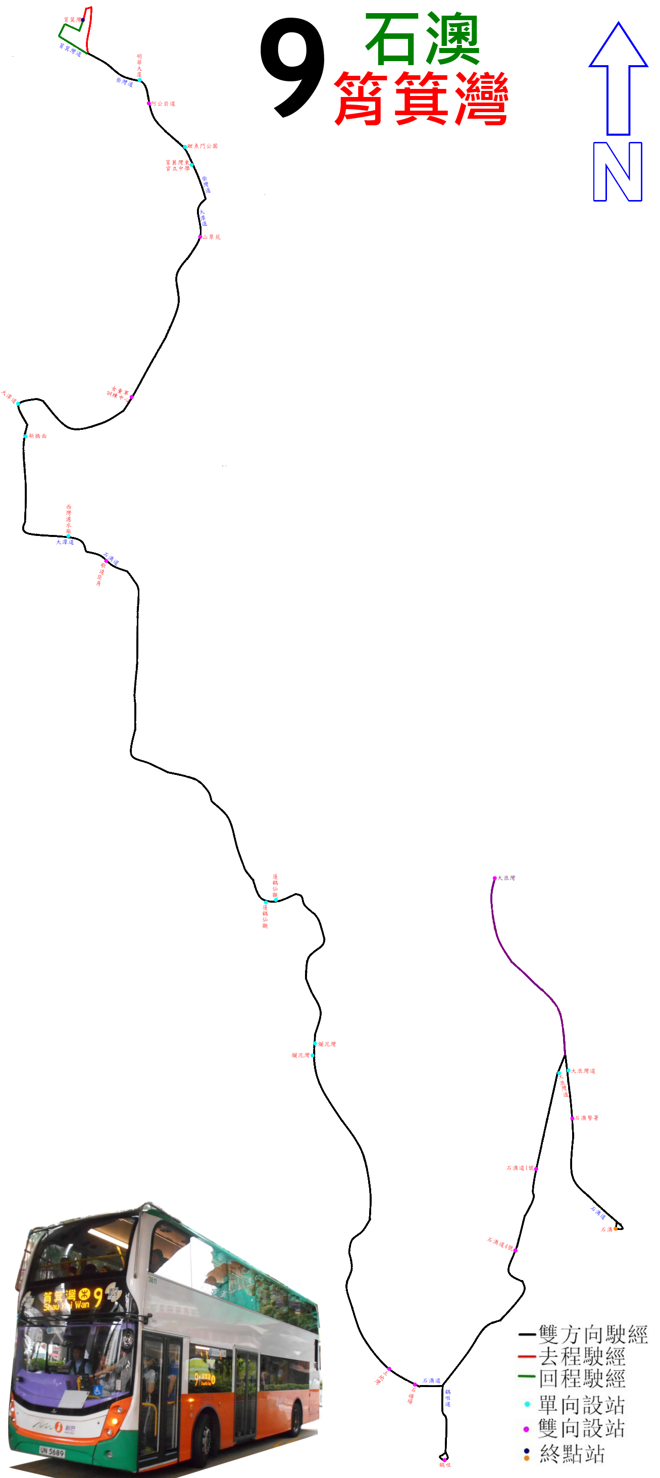 中文（香港）: 新巴9號線的走線圖(圖片候補)，紫線表示只在指定班次才駛經(大浪灣道)